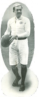 Médaillon extrait du magazine La vie au grand air représentant Marcel Communeau en pied